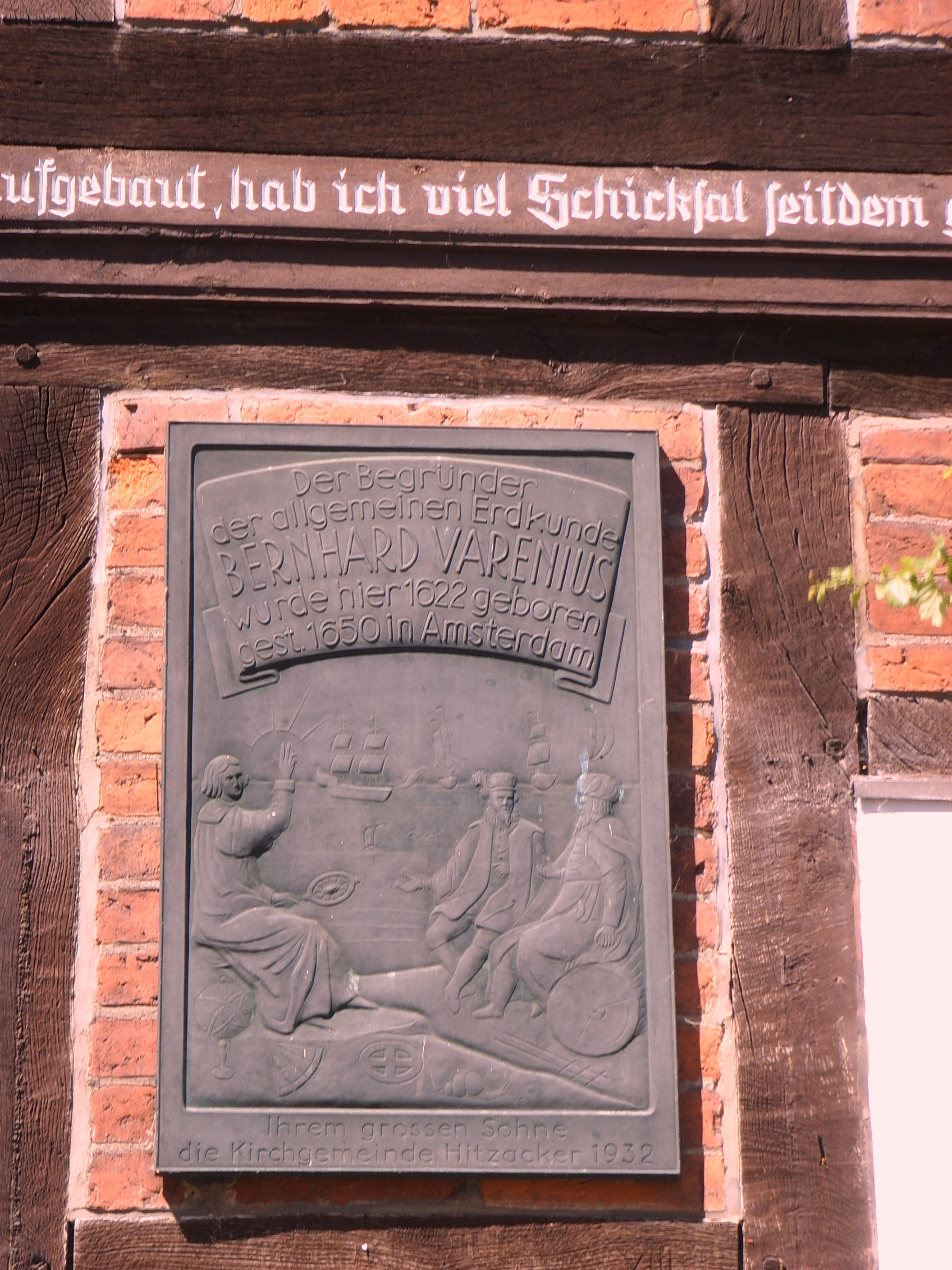 Gedenktafel am Geburtshaus des Geographen Bernhard Varenius in Hitzacker (Elbe)